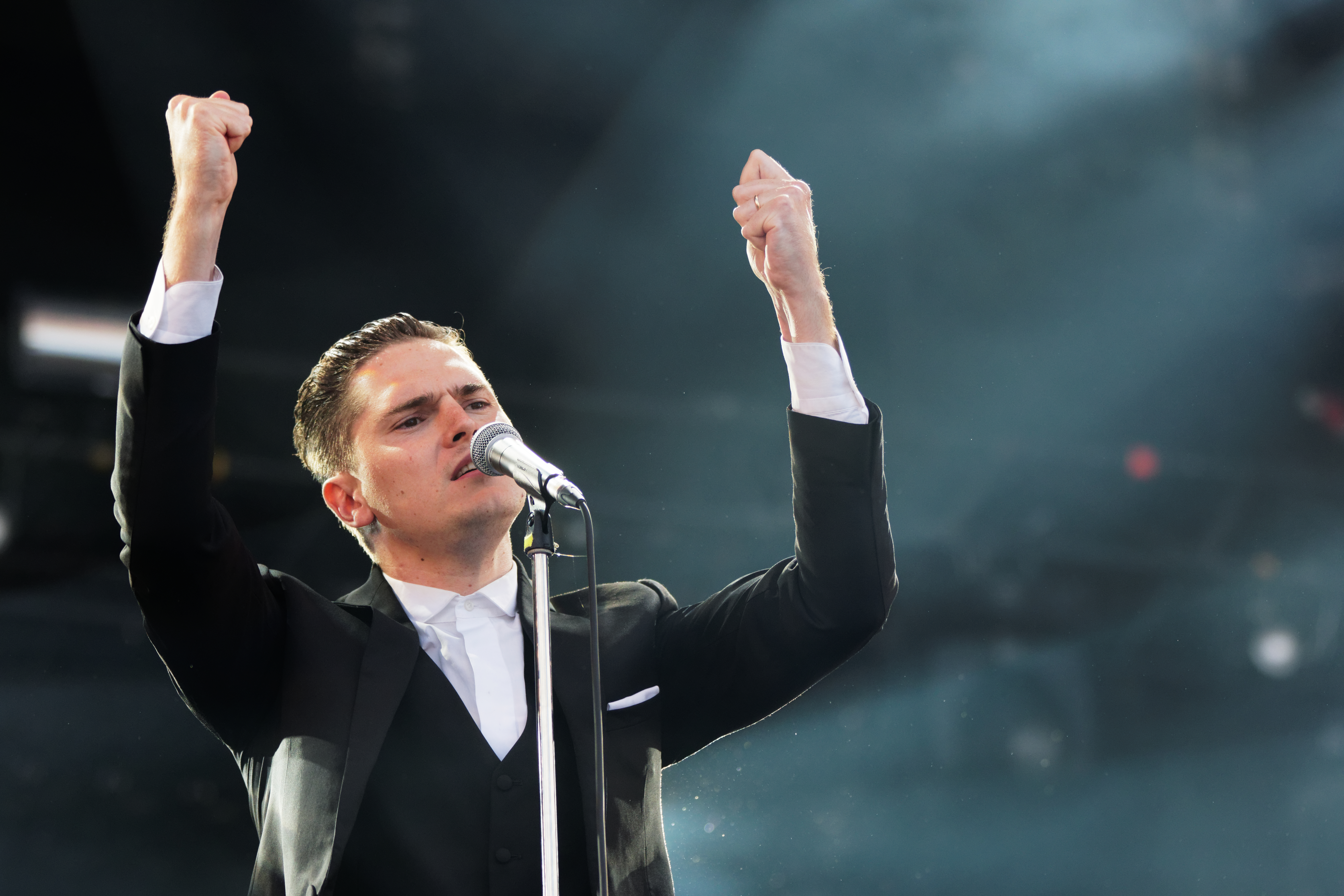 Her en concert lors du festival des vieilles charrues 2016.